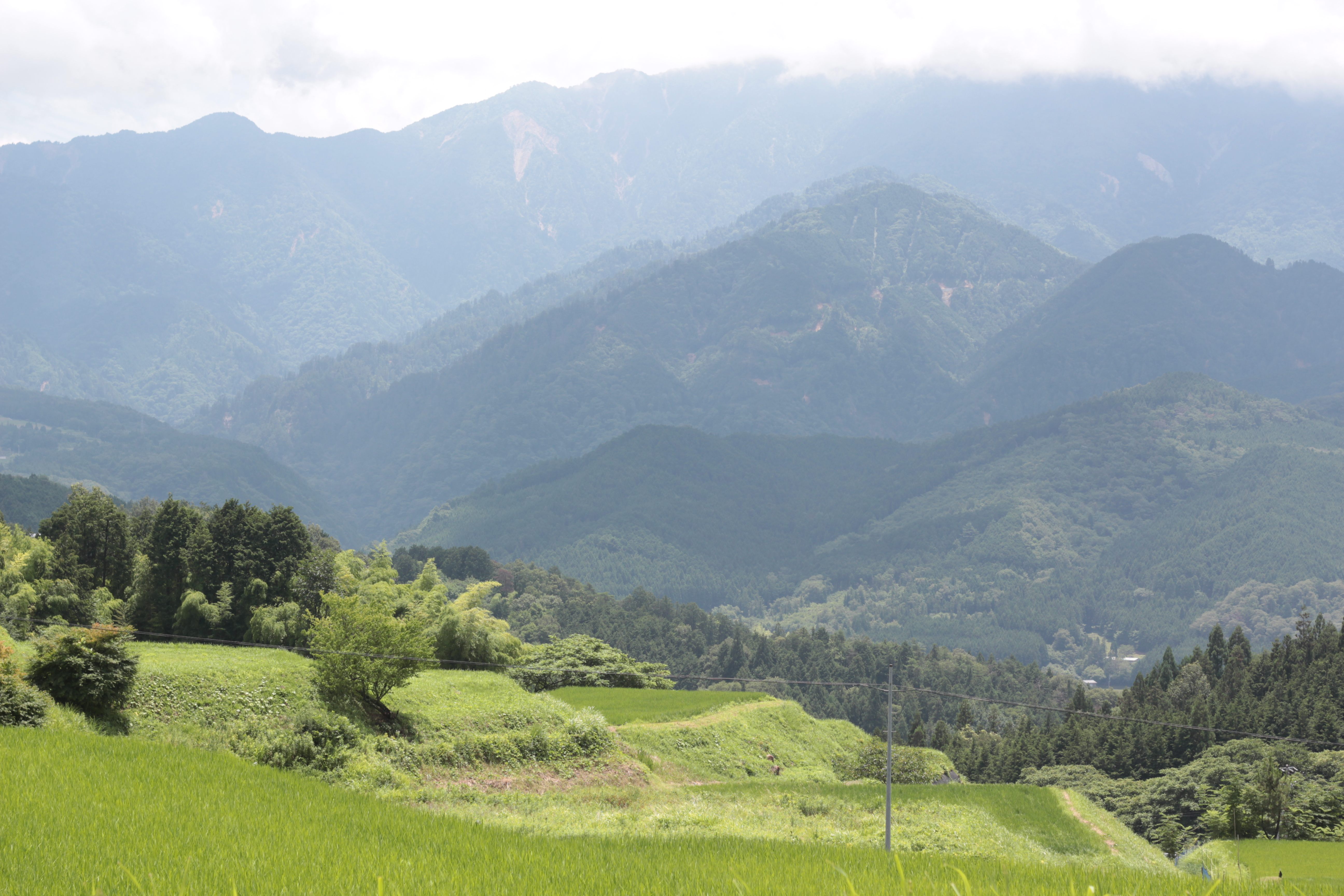 View from Magome-juku.